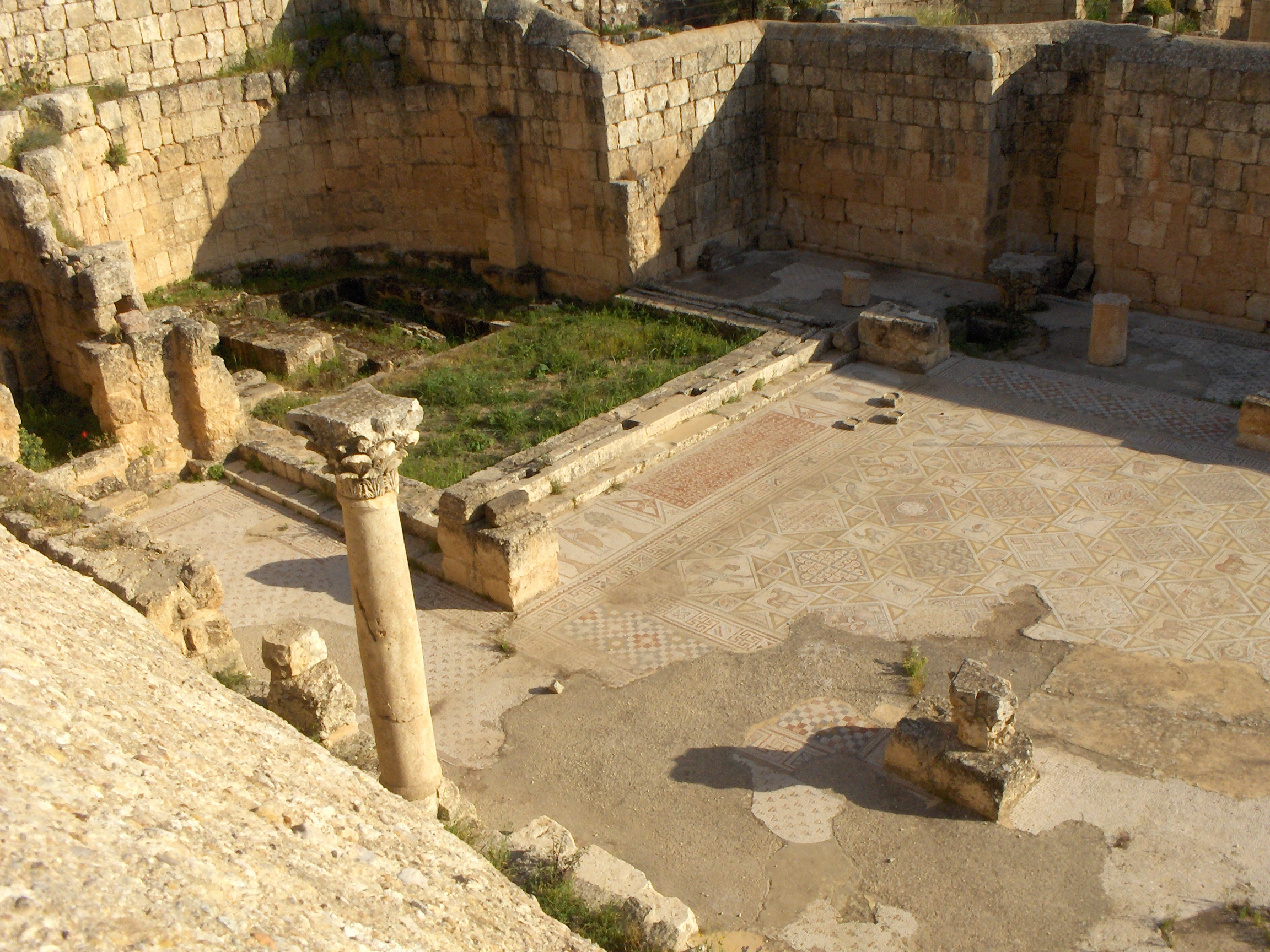 Abside della chiesa dei Santi Cosma e Damiano di Jerash, Giordania